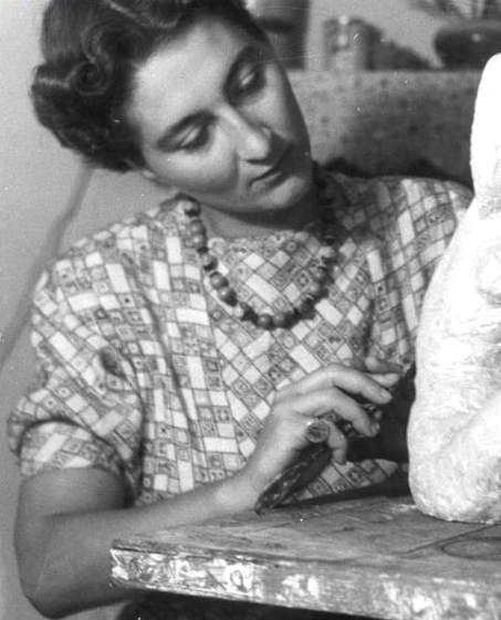 Zoe Băicoianu